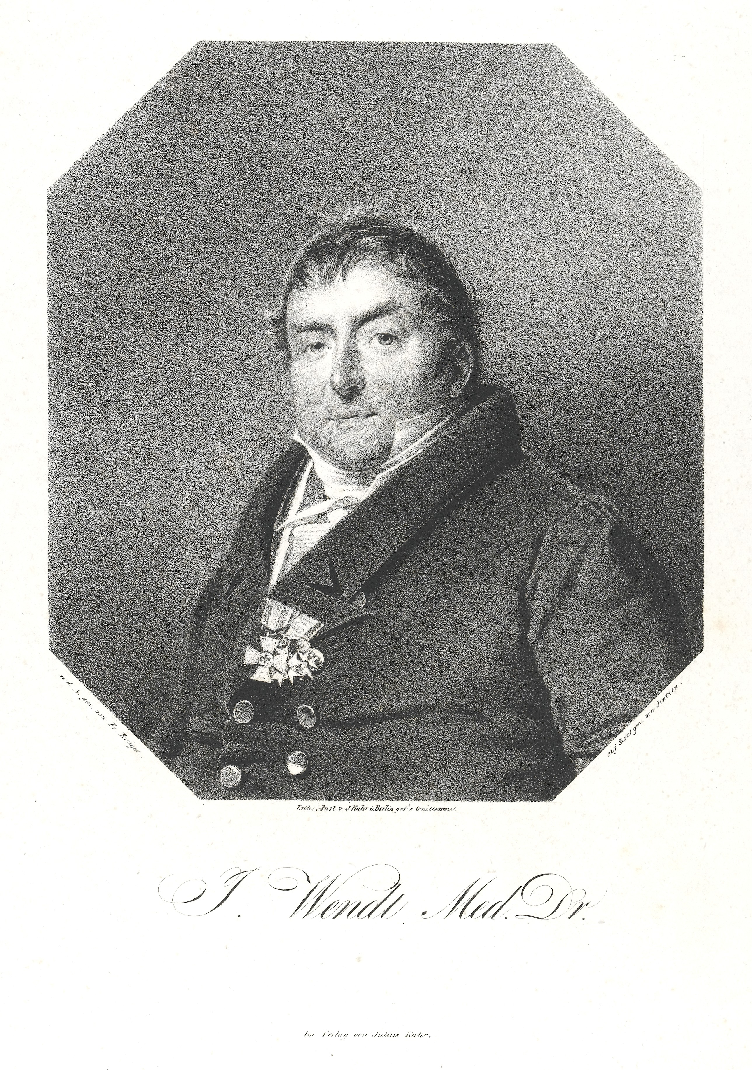 Johann Wendt. Physician and professor in Breslau. Iconographic Collections Keywords: Guillaume; Franz Krüger; Johann Wendt; Friedrich Jentzen